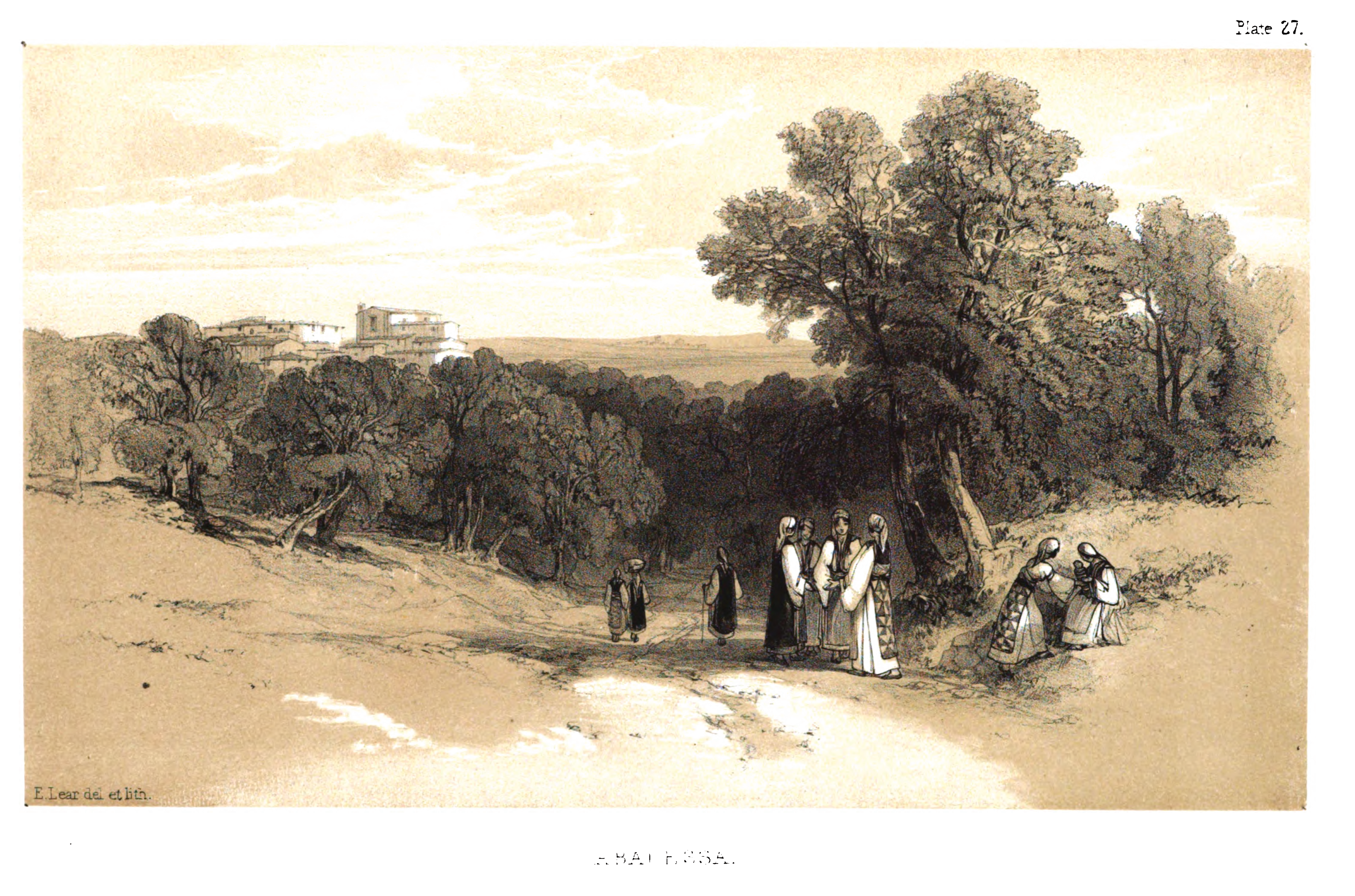 Villa Badessa im Jahr 1846